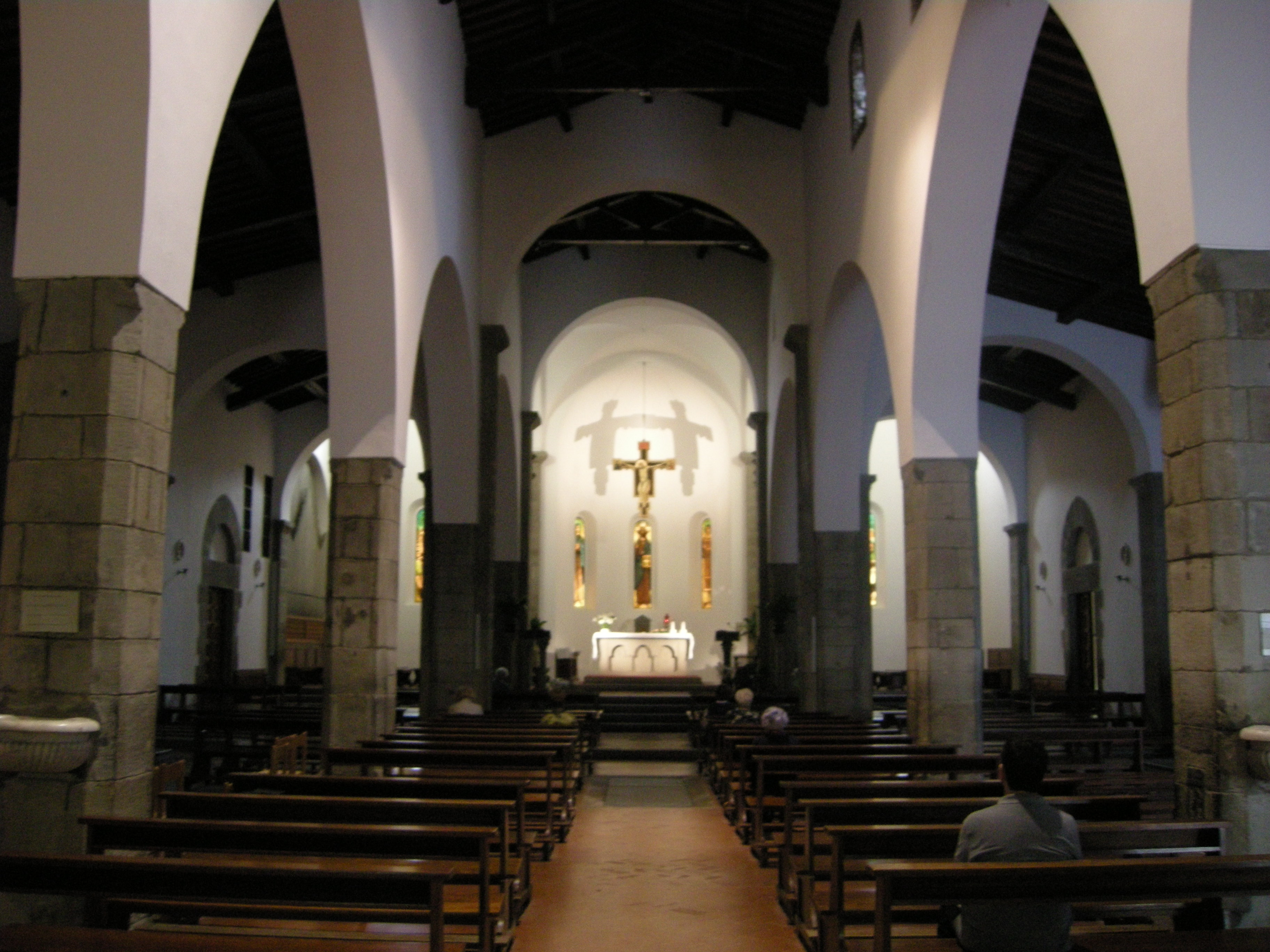 Santo stefano in pane, interno